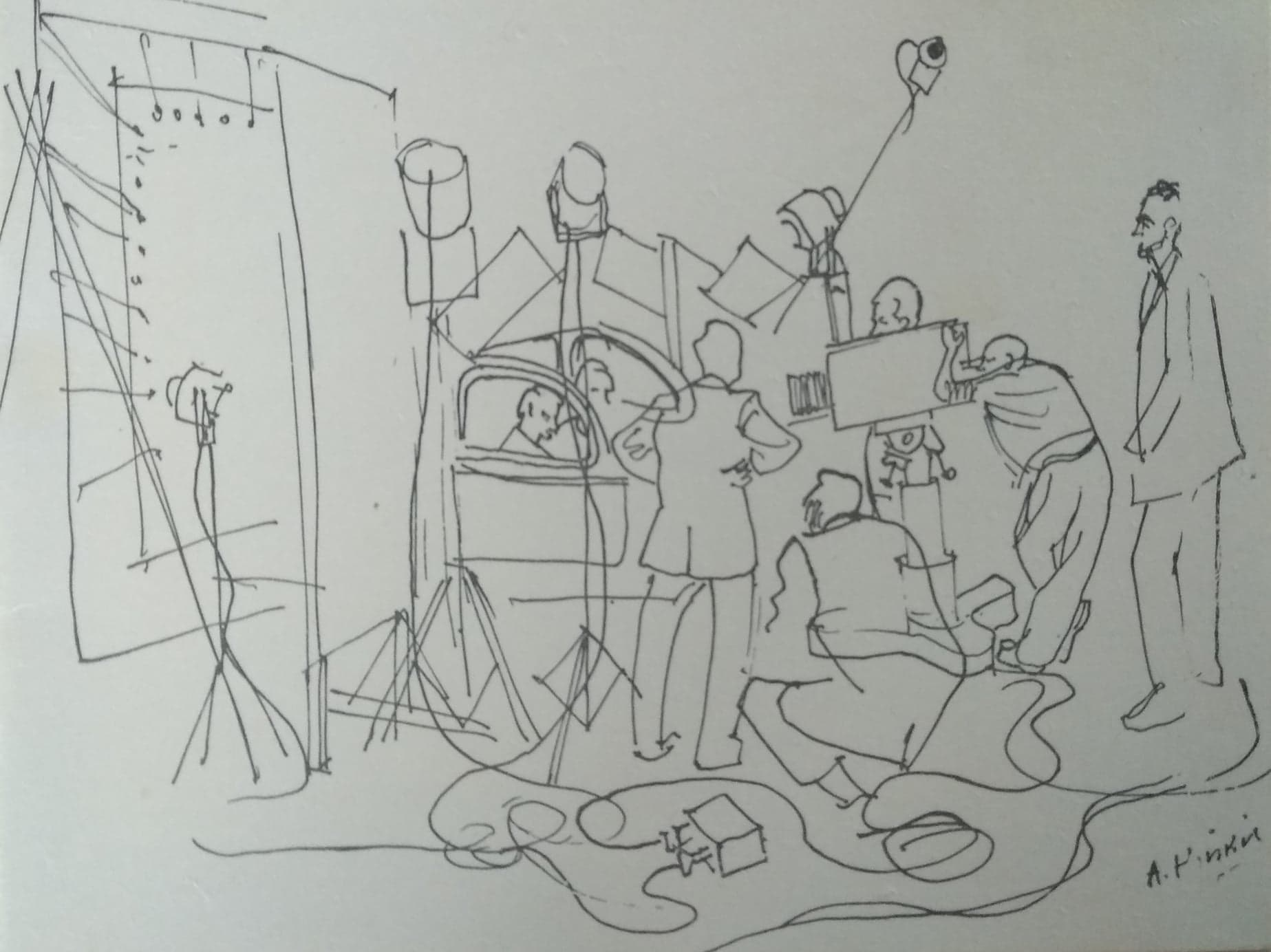 Dessin décor de film personnages dans voiture